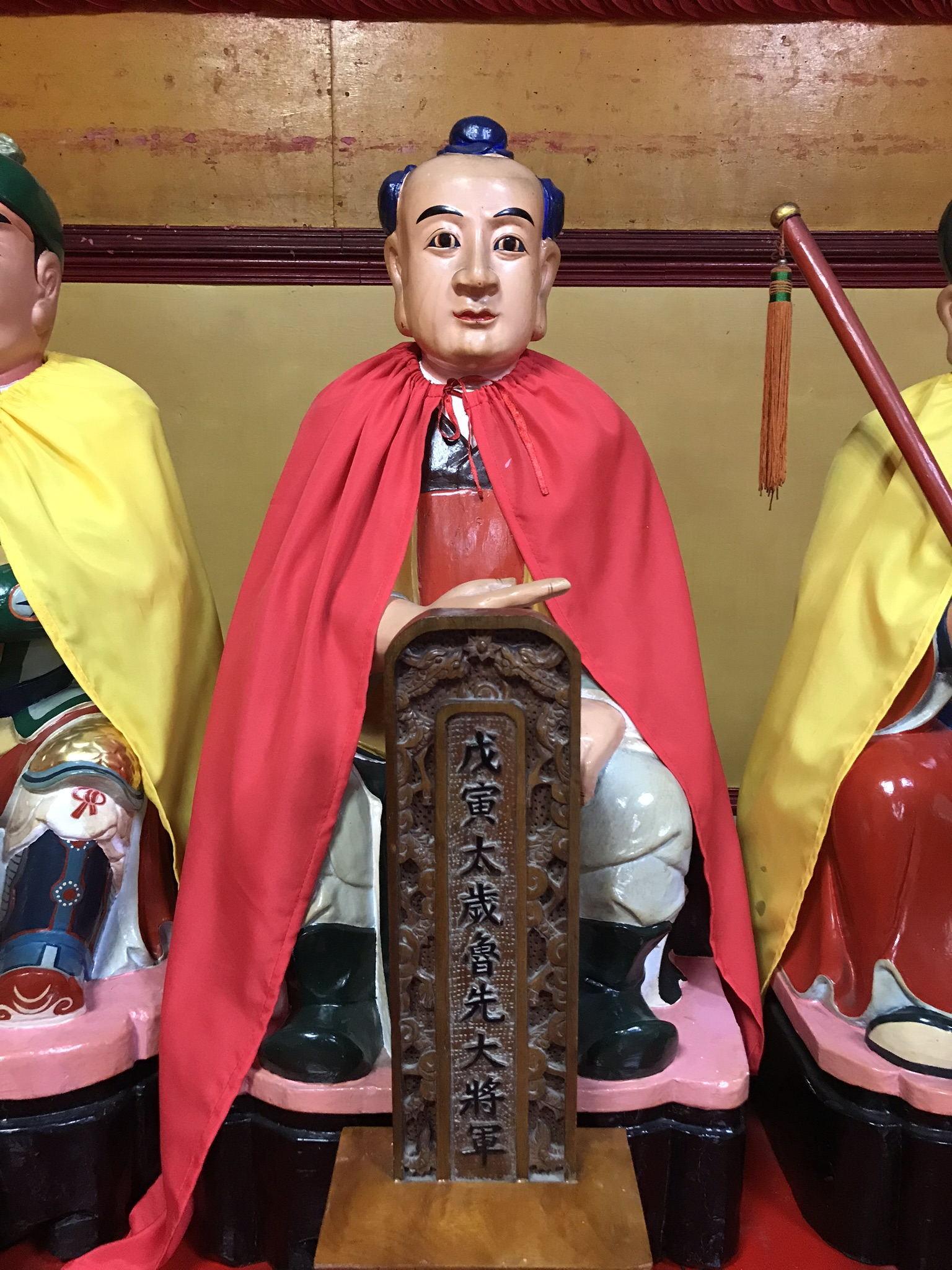 麻豆代天府戊寅太歲魯先大將軍神像